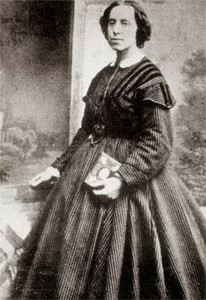 The­re­sia von Wüllen­we­ber